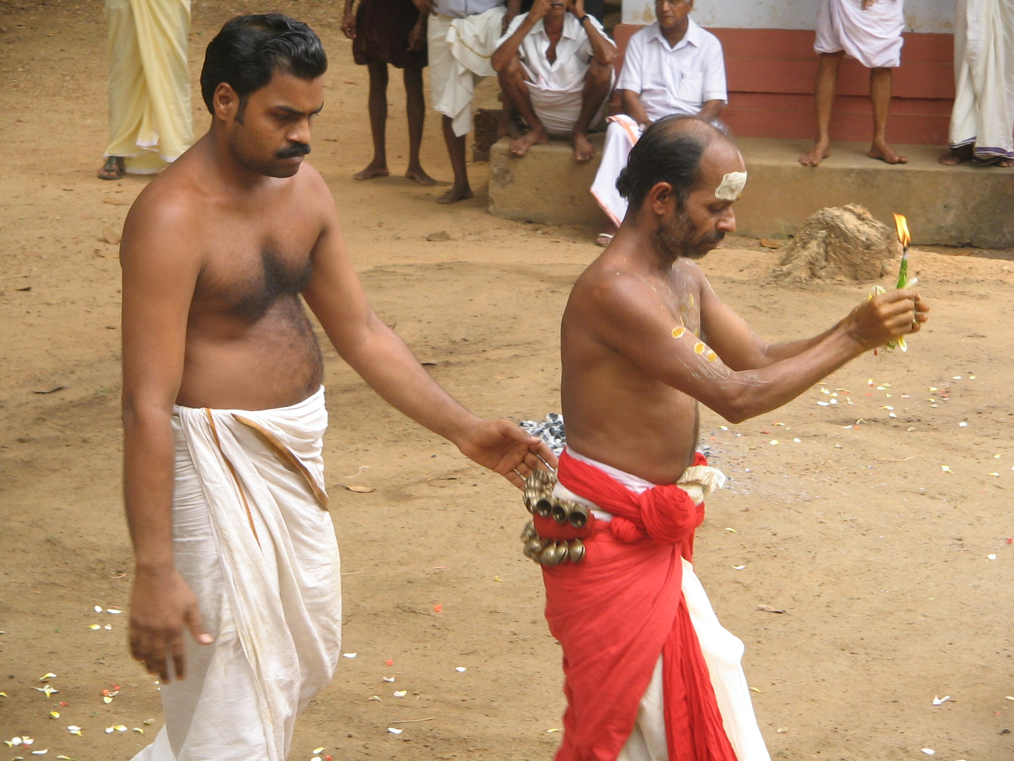 പാലുംവെള്ളരി കളപ്രദക്ഷിണം. സ്ഥലം: വെള്ളക്കാട്ടുമന